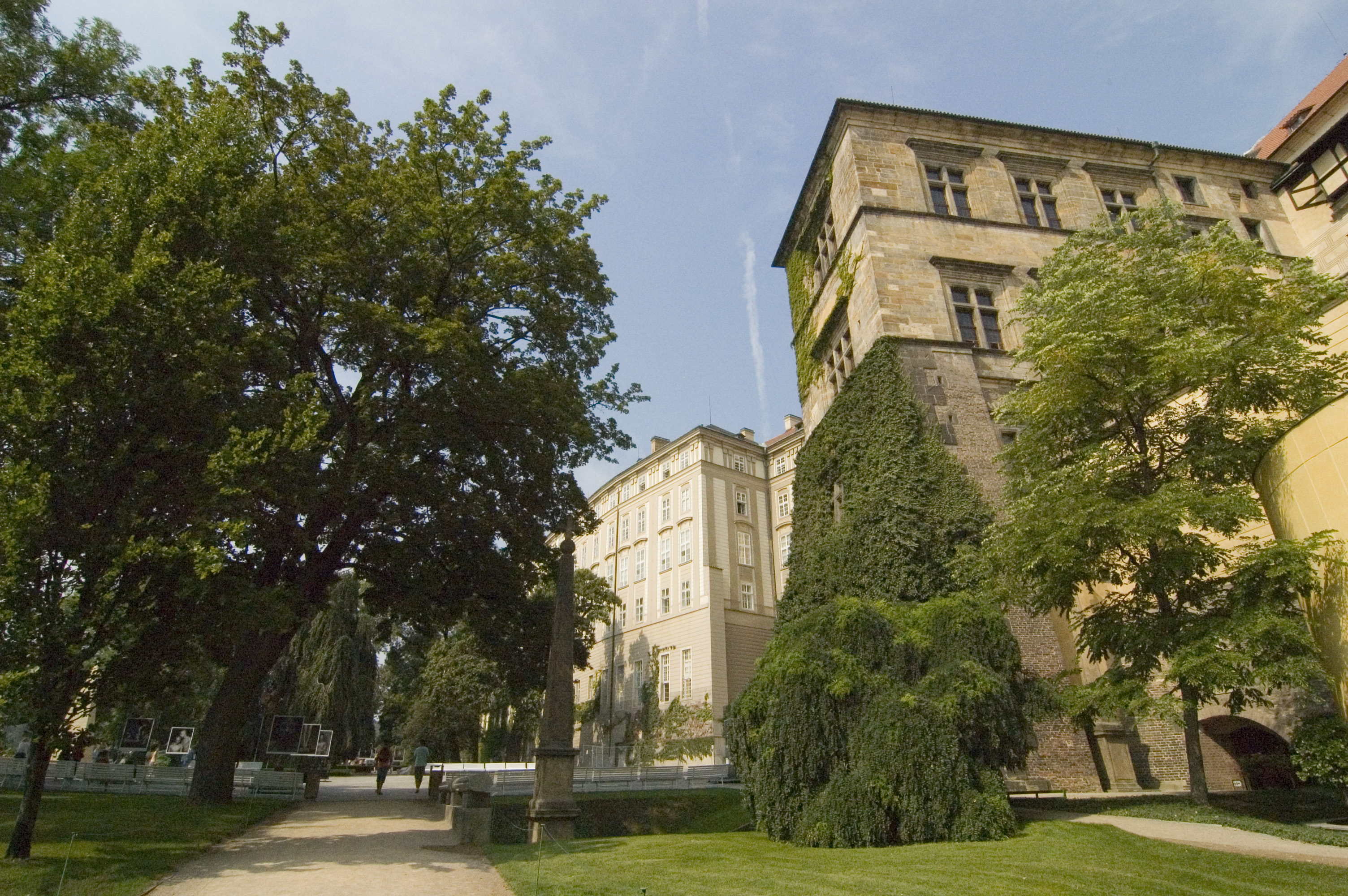 Pražský hrad, zahrada Na Valech, v popředí vpravo Ludvíkovo křídlo Starého královského paláce, v pozadí Nový královský palác